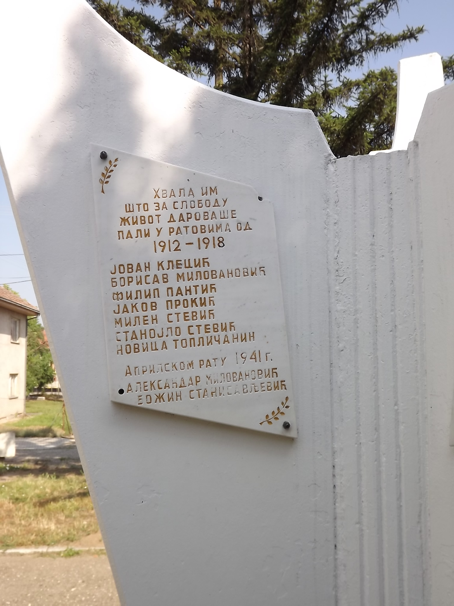 Srpski (latinica): Spomenik borcima u oslobodilačkim ratovima, selo Stari Trstenik . Fotografija nastala u okviru saradnje Narodnog univerziteta Trstenik. Narodne biblioteke Jefimija i Savez boraca Trstenik.